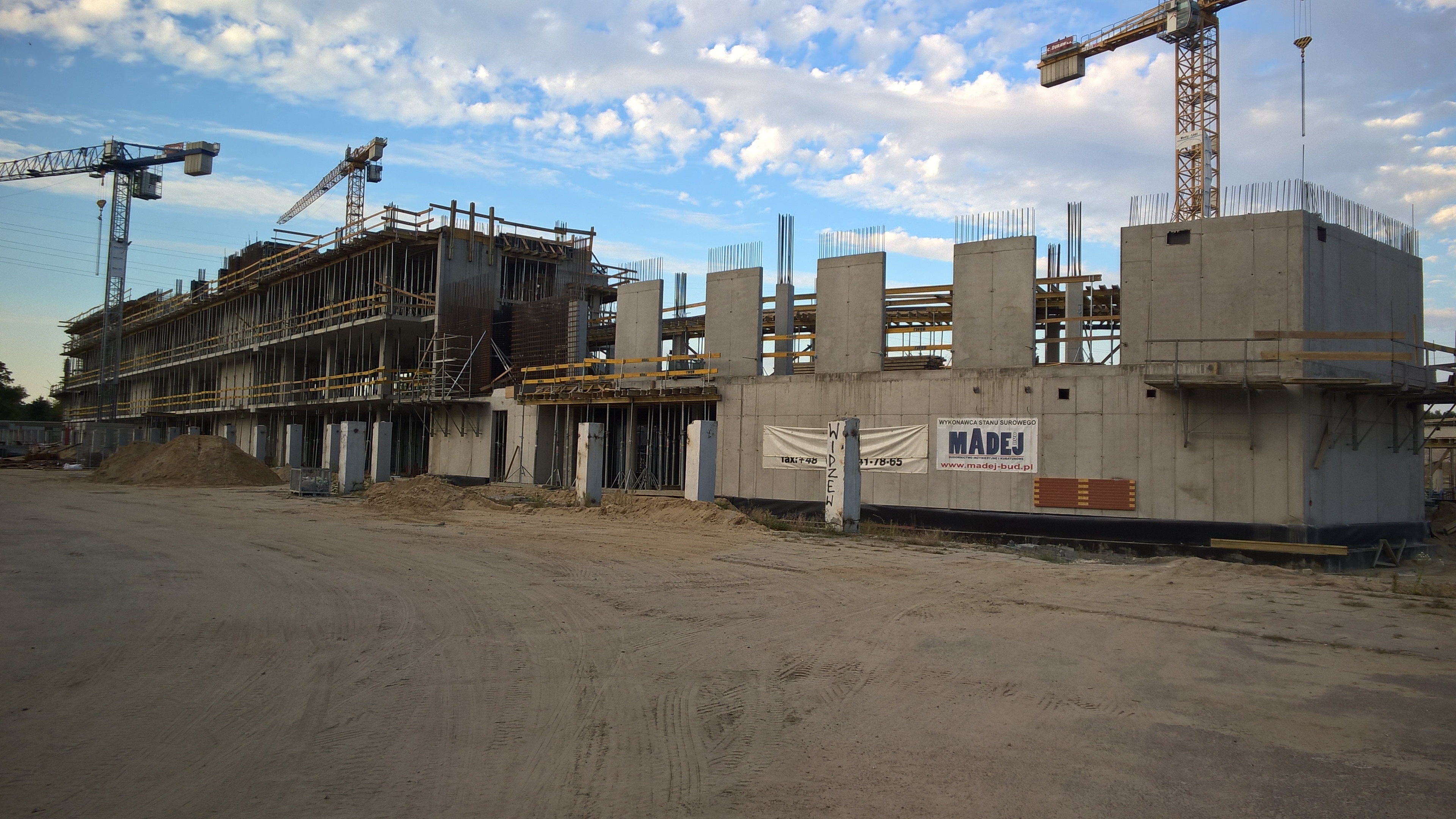 Budowa stadionu Widzewa Łódź - sierpień 2015